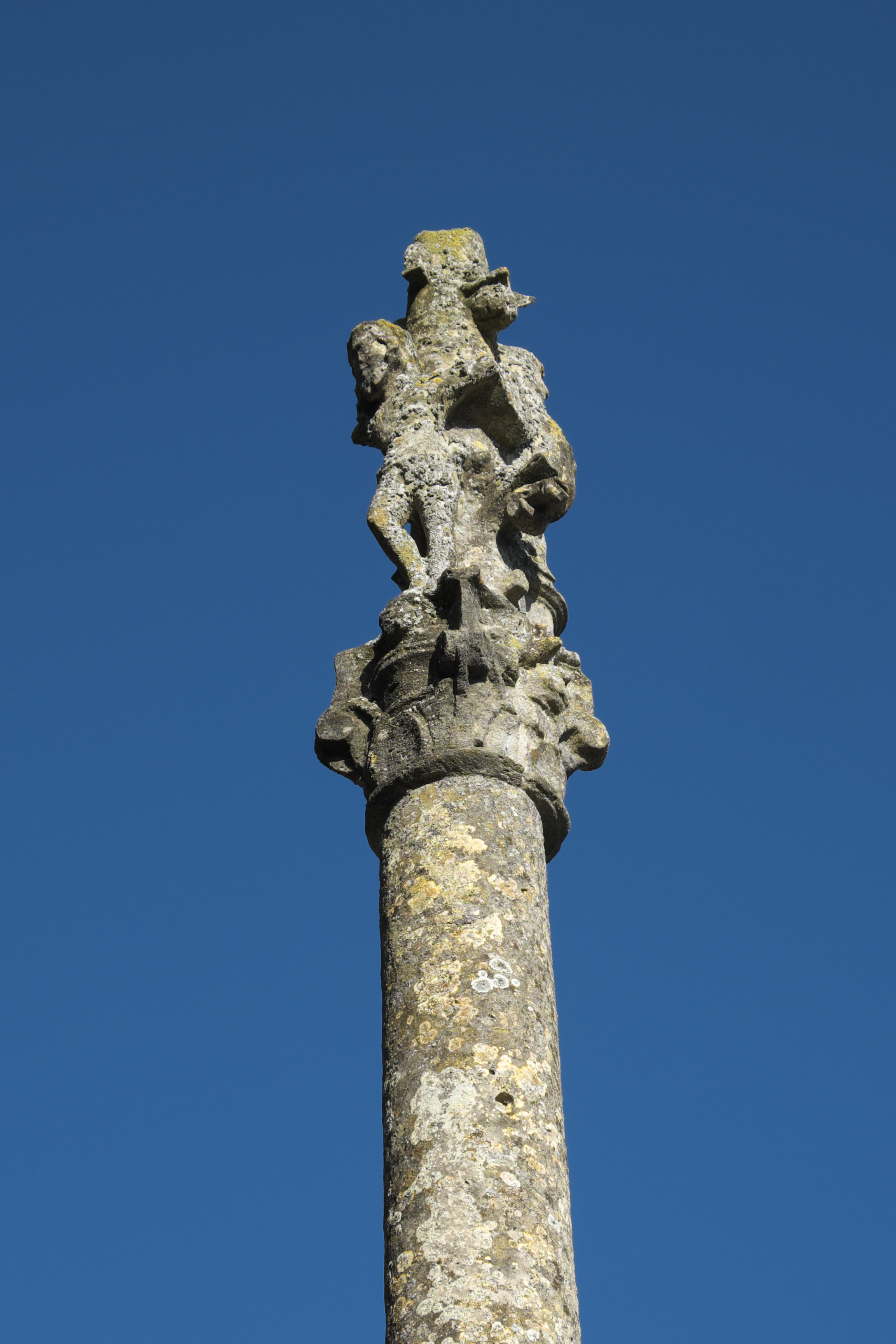 Kruzifix (Calvaire) gegenüber der Katholischen Pfarrkirche Notre-Dame de l’Assomption in Champagne-sur-Oise (Département Val-d’Oise) in der Region Île-de-France (Frankreich)